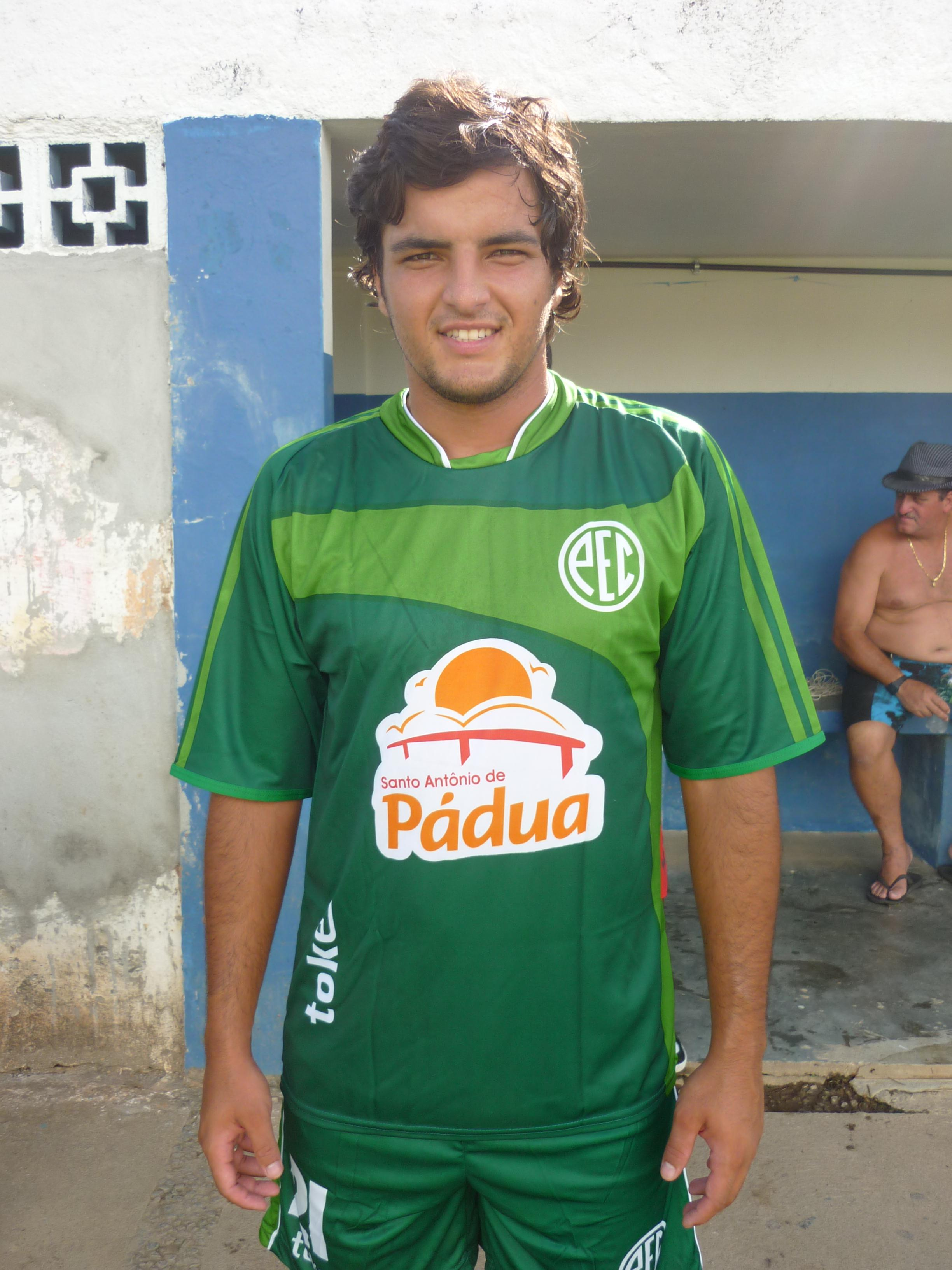 Foto de divulgação da nova camisa verde do Paduano.